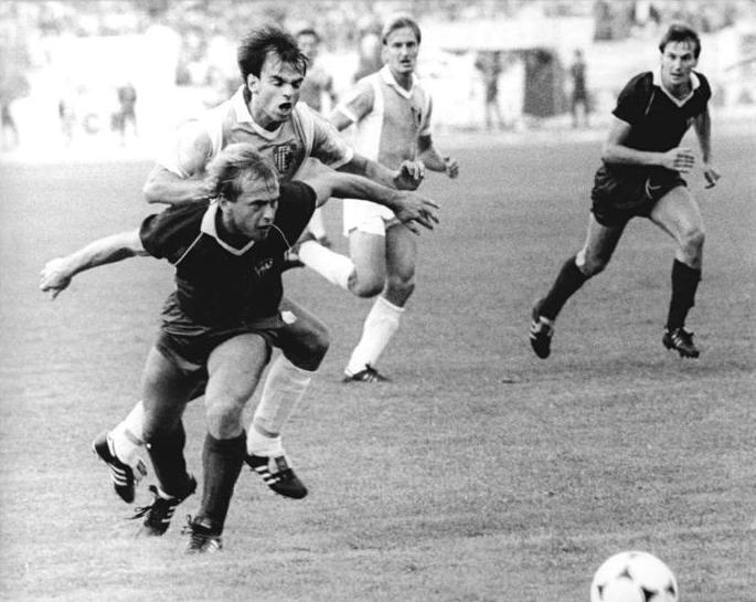 ADN-ZB-Thieme- -22.9.89- Karl-Marx-Stadt: Fußball-Oberliga- FC Karl-Marx-Stadt - SFC 0:0. In diesem kampfbetonten Spiel bestimmte der Platzbesitzer eine Halbzeit lang mit Angriffsdruck vor allem durch Rico Steinmann das Geschehen, der hier durch BFC-Abwehrspieler Marco Köller abgedrängt wird.